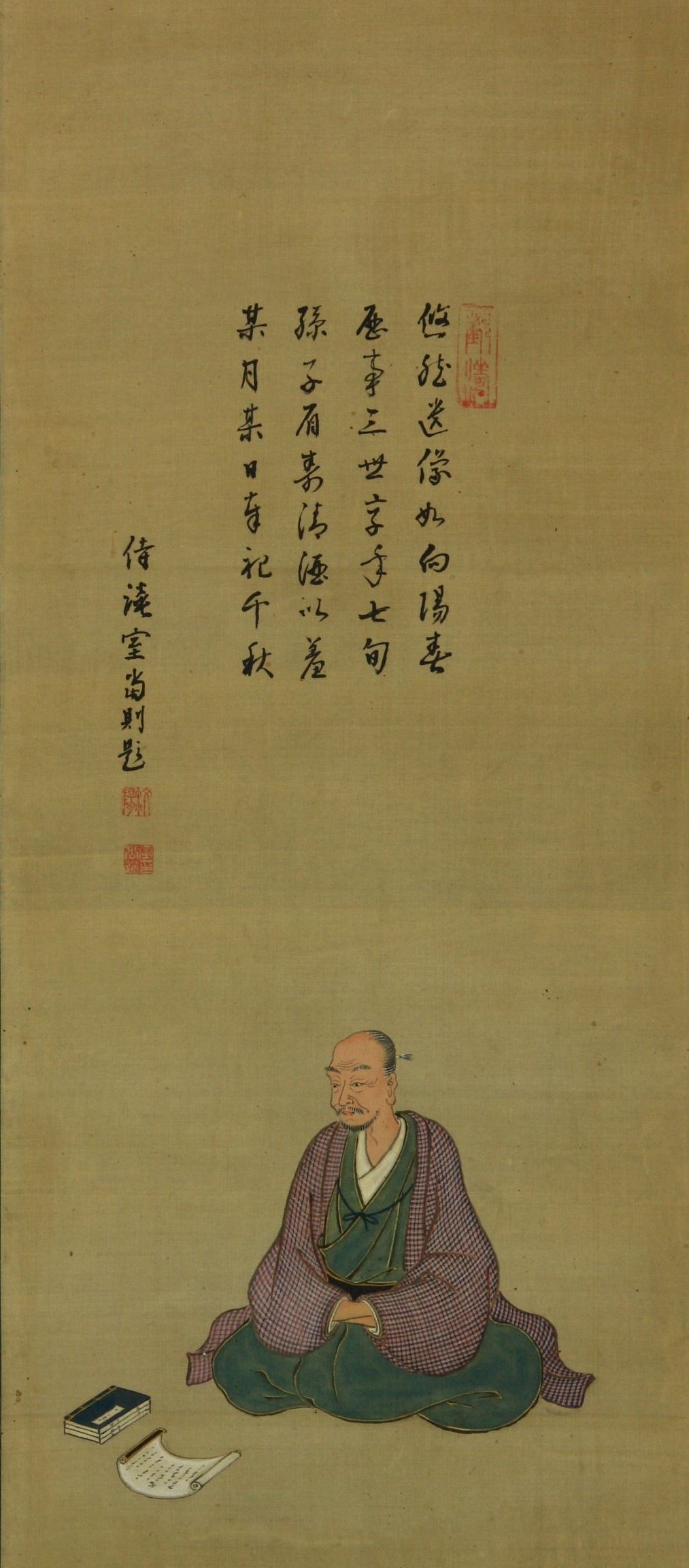 室鳩巣の肖像画。